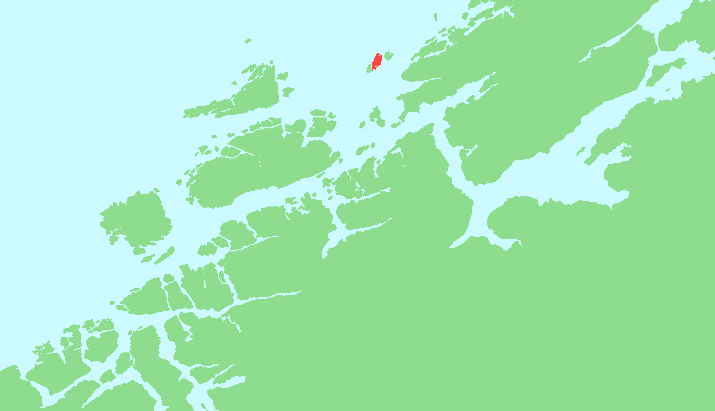 Locator map of Husøya, Sør-Trøndelag, Norway